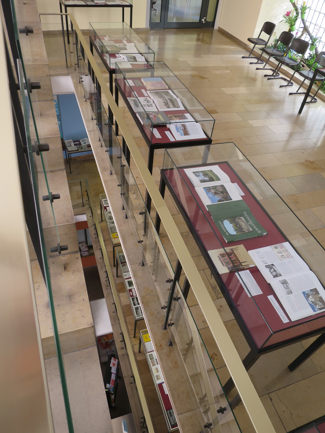 Treppenhaus der Stadtbibliothek Worms mit der Ausstellung: 40 Jahre Wernersche Verlagsgesellschaft